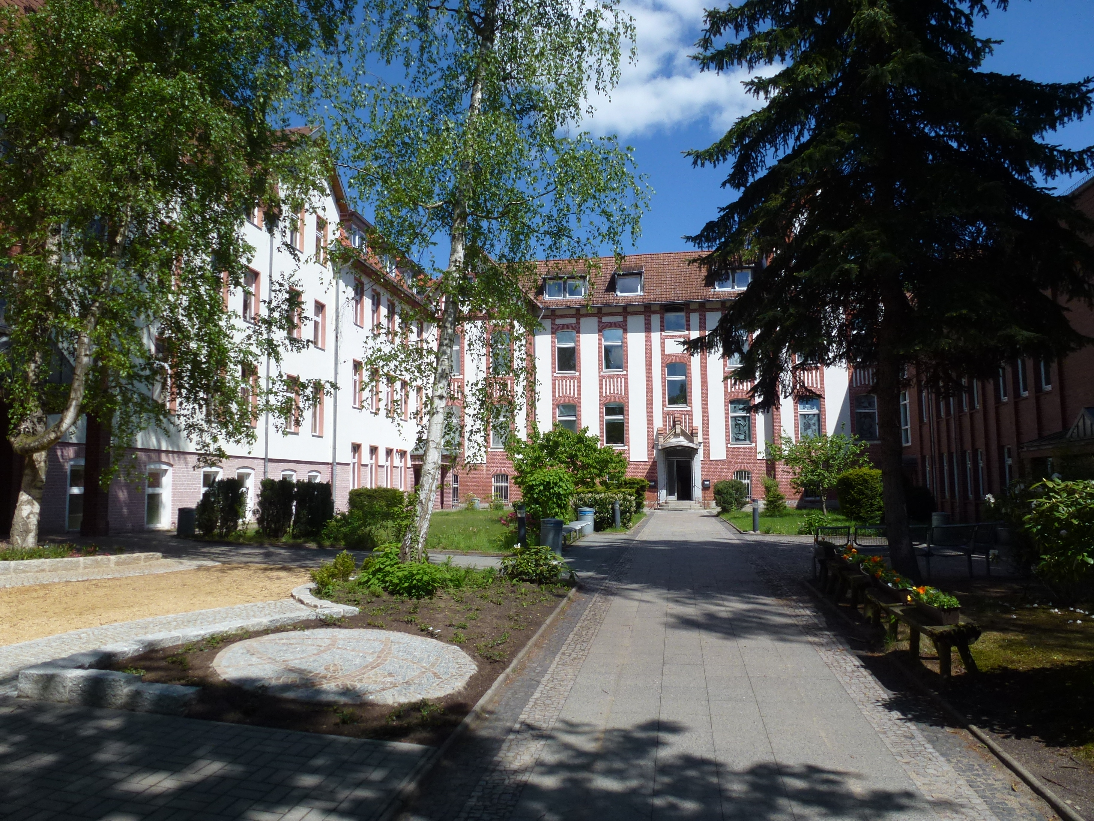 Berlin-Waidmannslust Fürst-Bismarck-Straße